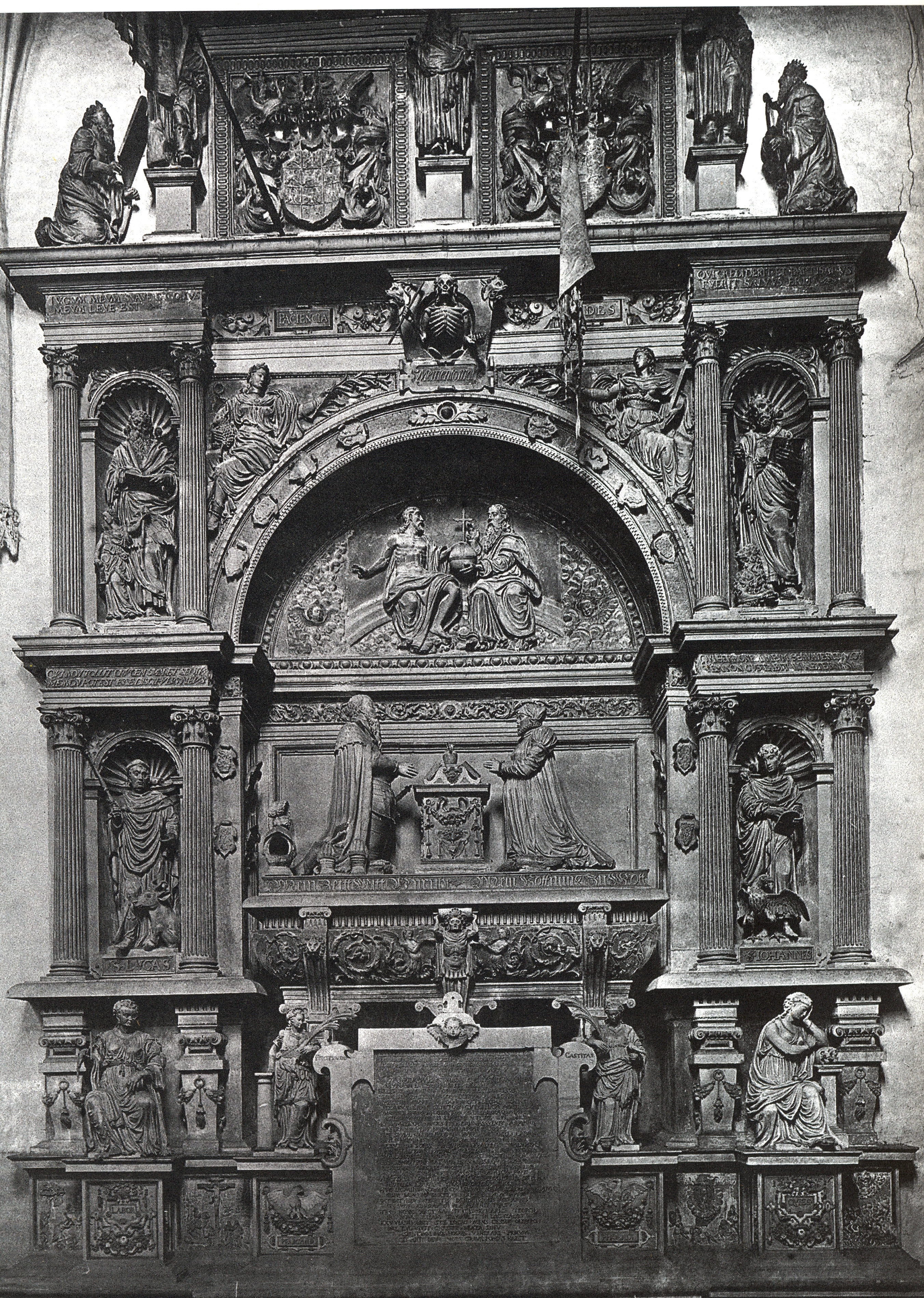 Königsberg, Dom, Grabdenkmal GEORG FRIEDRICH Markgraf von Brandenburg-Ansbach Kulmbach-Bayreuth und ELISABETH Markgräfin von Brandenburg-Küstrin